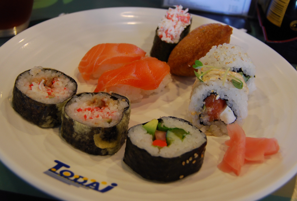 sushi